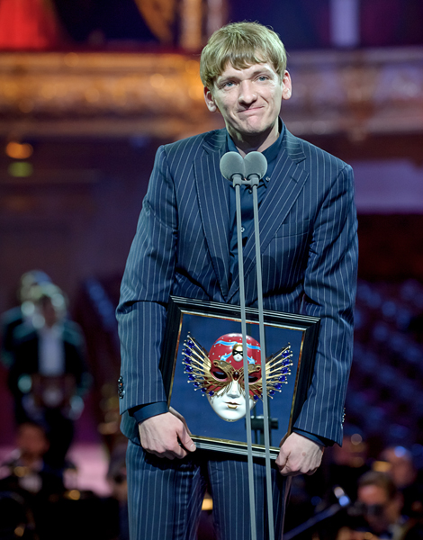 Алексей Вертков, Фотограф Дмитрий Дубинский 2014